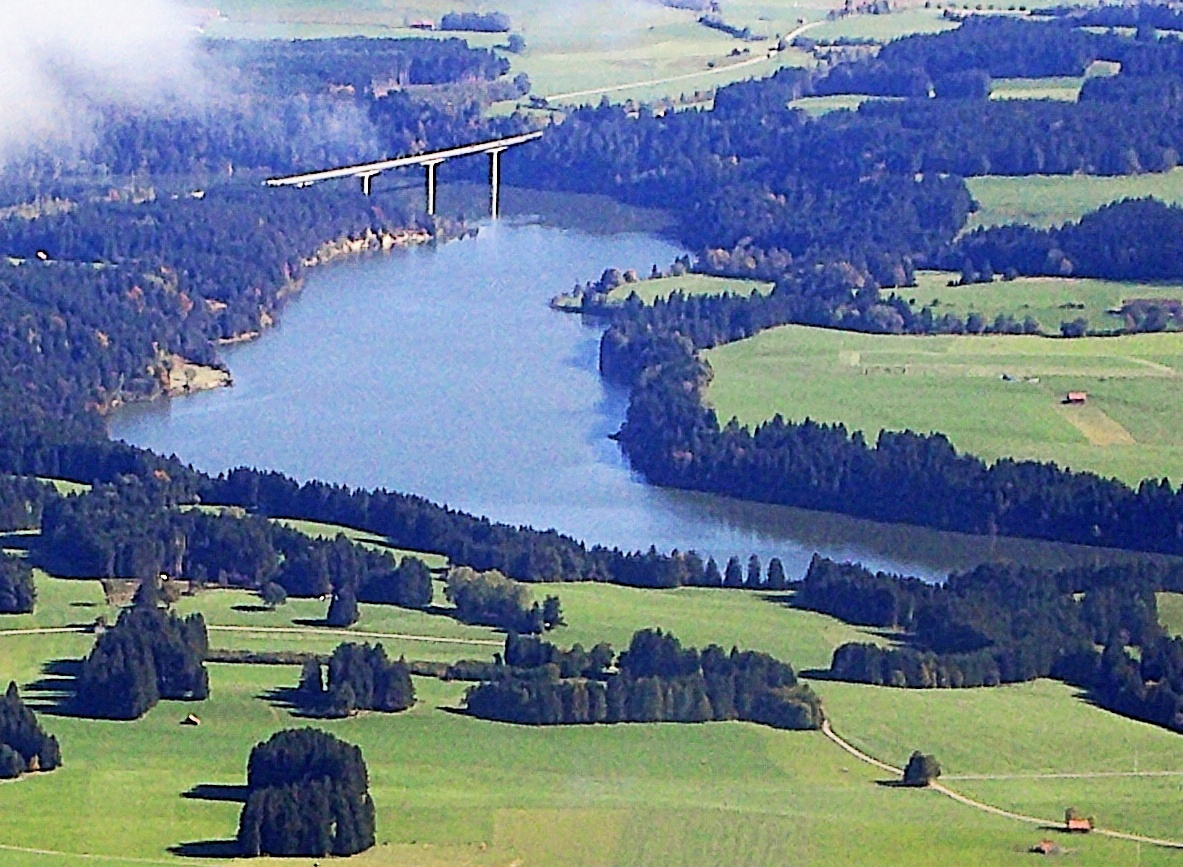 Stausee der Lechstaustufe 6 (südlicher Teil), links im Hintergrund die Lechtalbrücke (Schongau, Überführung der Bundesstraßen 17 und 472)